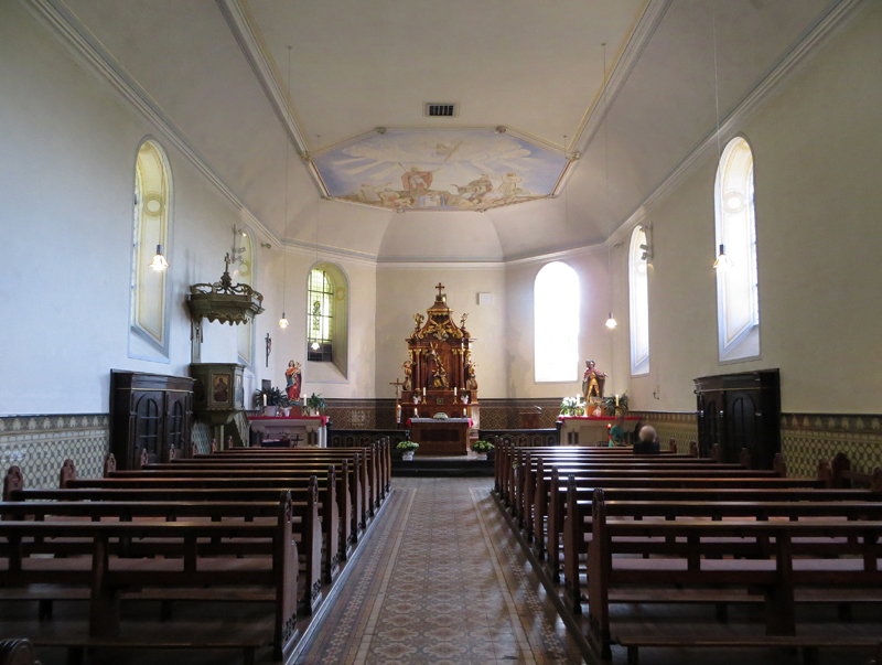 Blick ins Innere der Kirche St. Gangolf, Gemeinde Mettlach, Landkreis Merzig-Wadern, Saarland. Die Kirche wurde im Jahr 1775 errichtet.